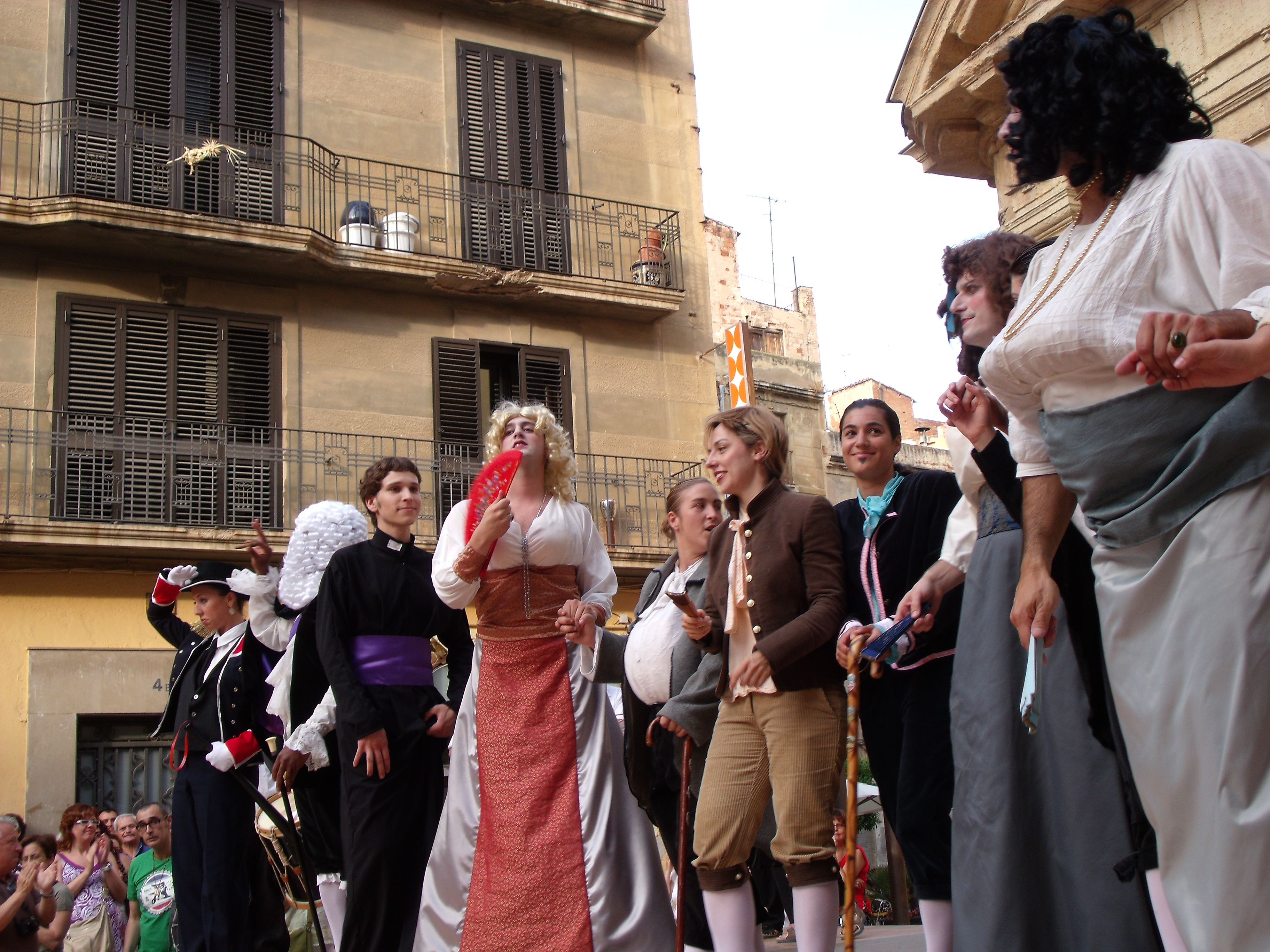 Dames i Vells de Reus